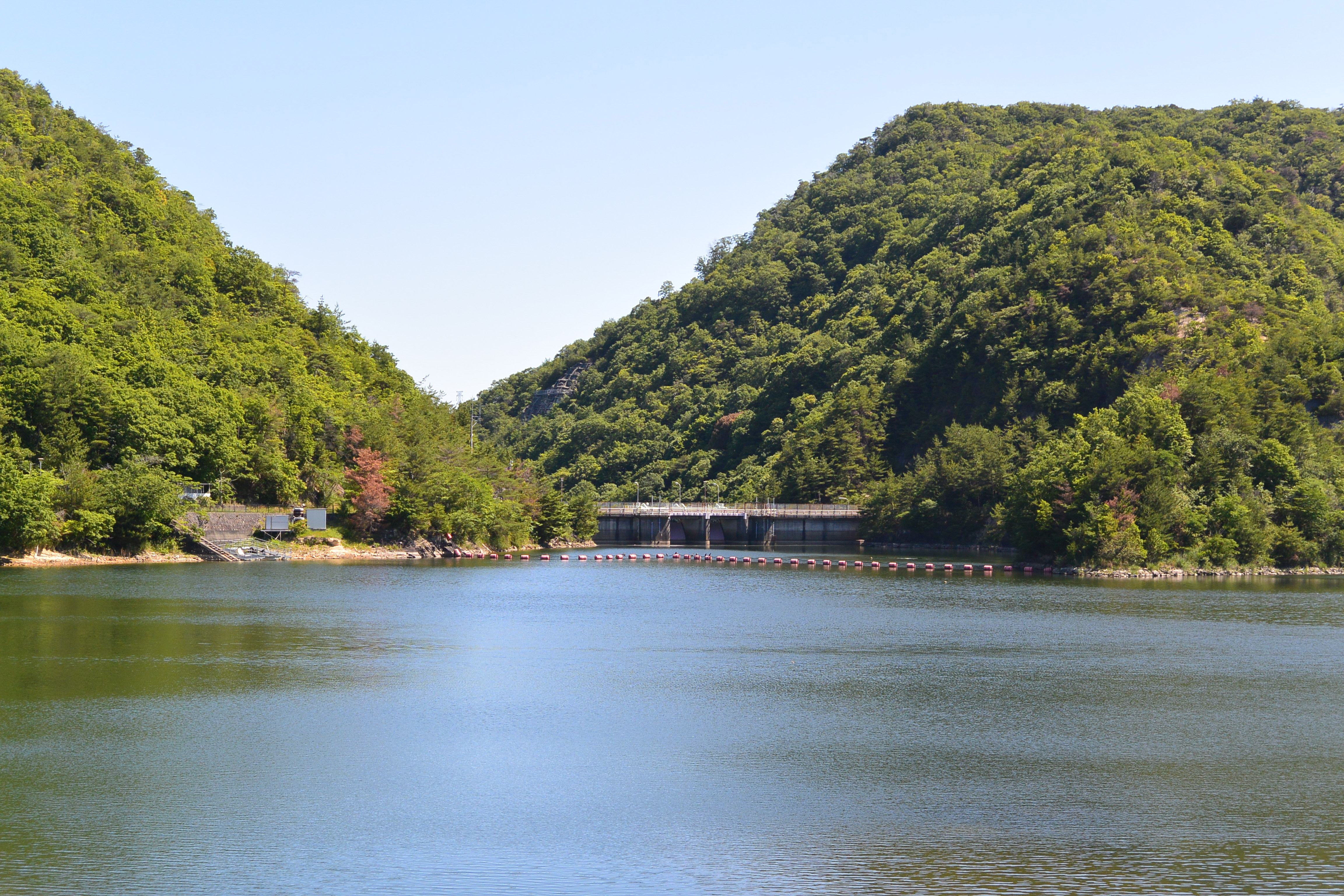 兵庫県西宮市北部にある丸山ダムと金仙寺湖 Nikon 1 AW1 + 1 Nikkor AW 11-27.5mm f/3.5-5.6